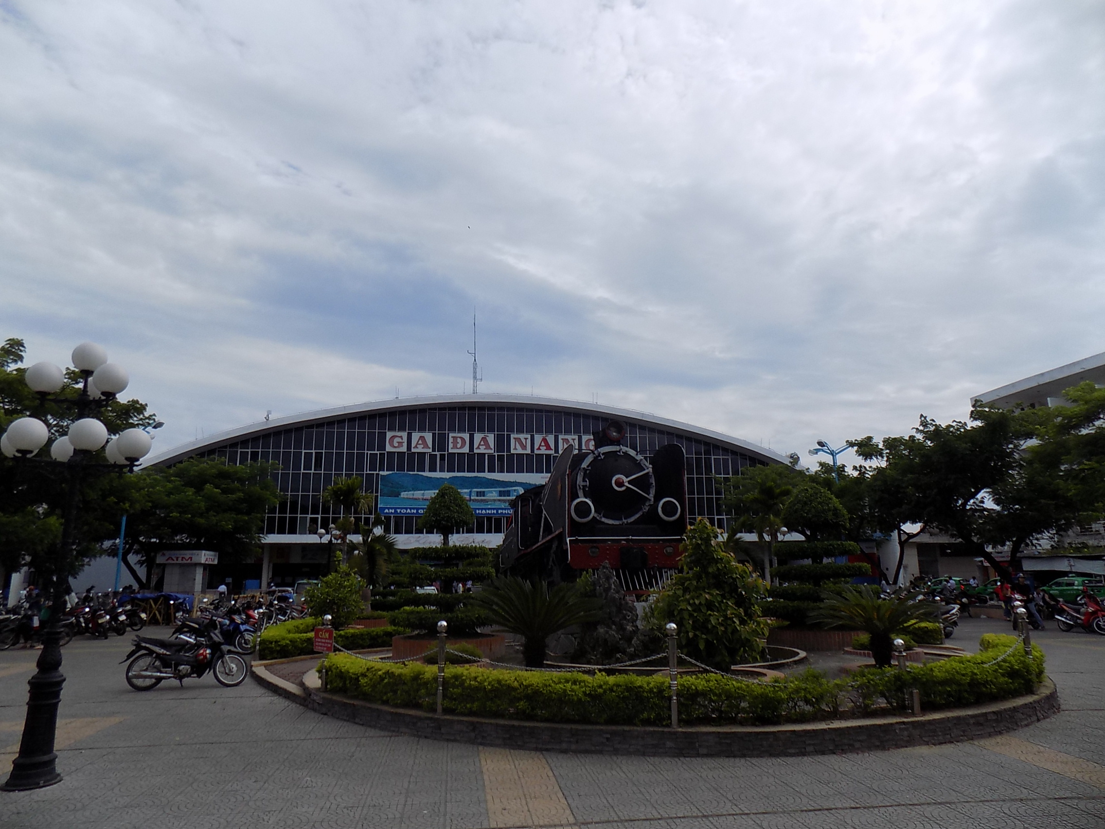 Entrée principale de la gare de Da Nang au Vietnam